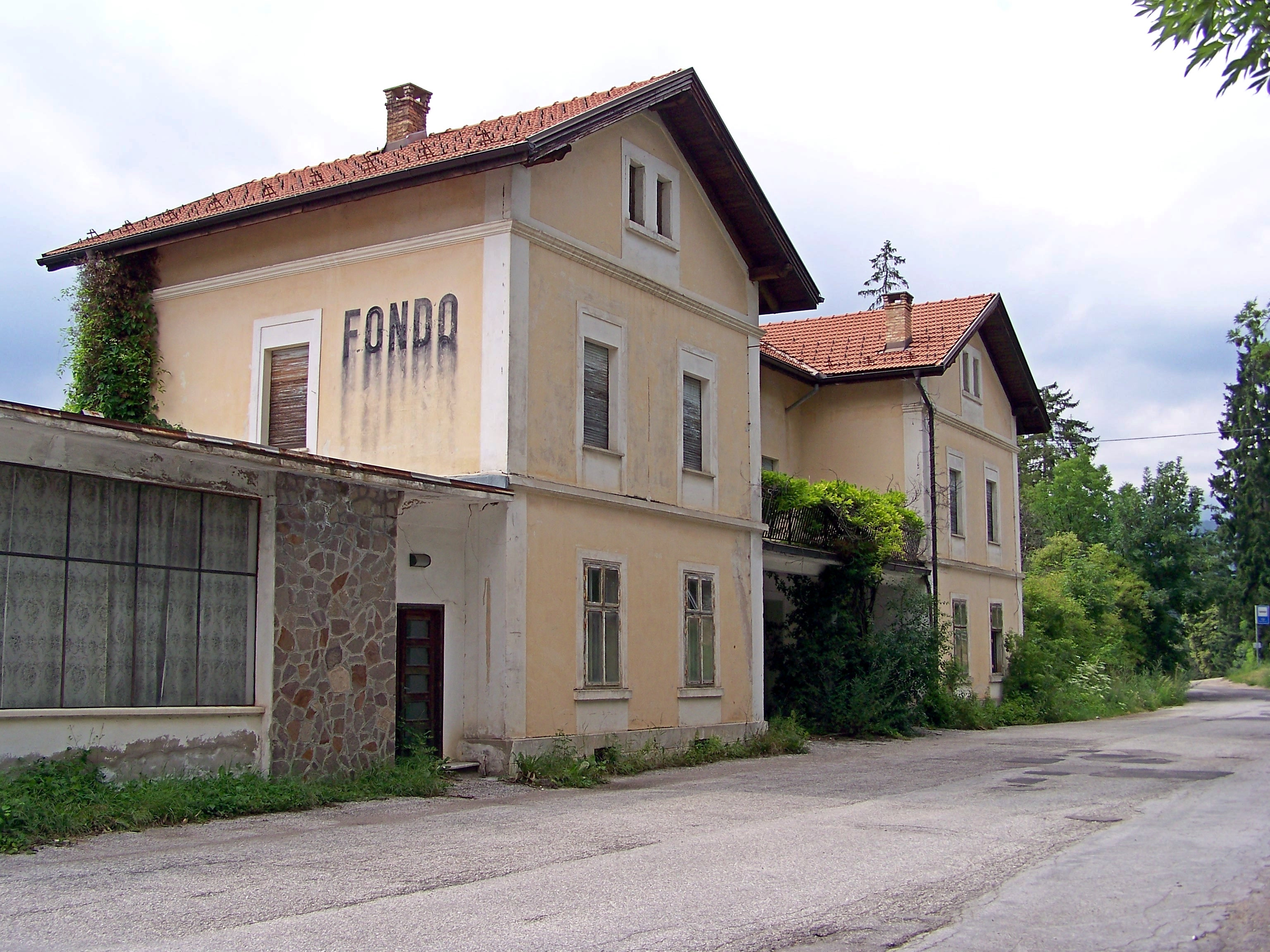 Fabbricato viaggiatori della dismessa stazione tranviaria di Fondo.